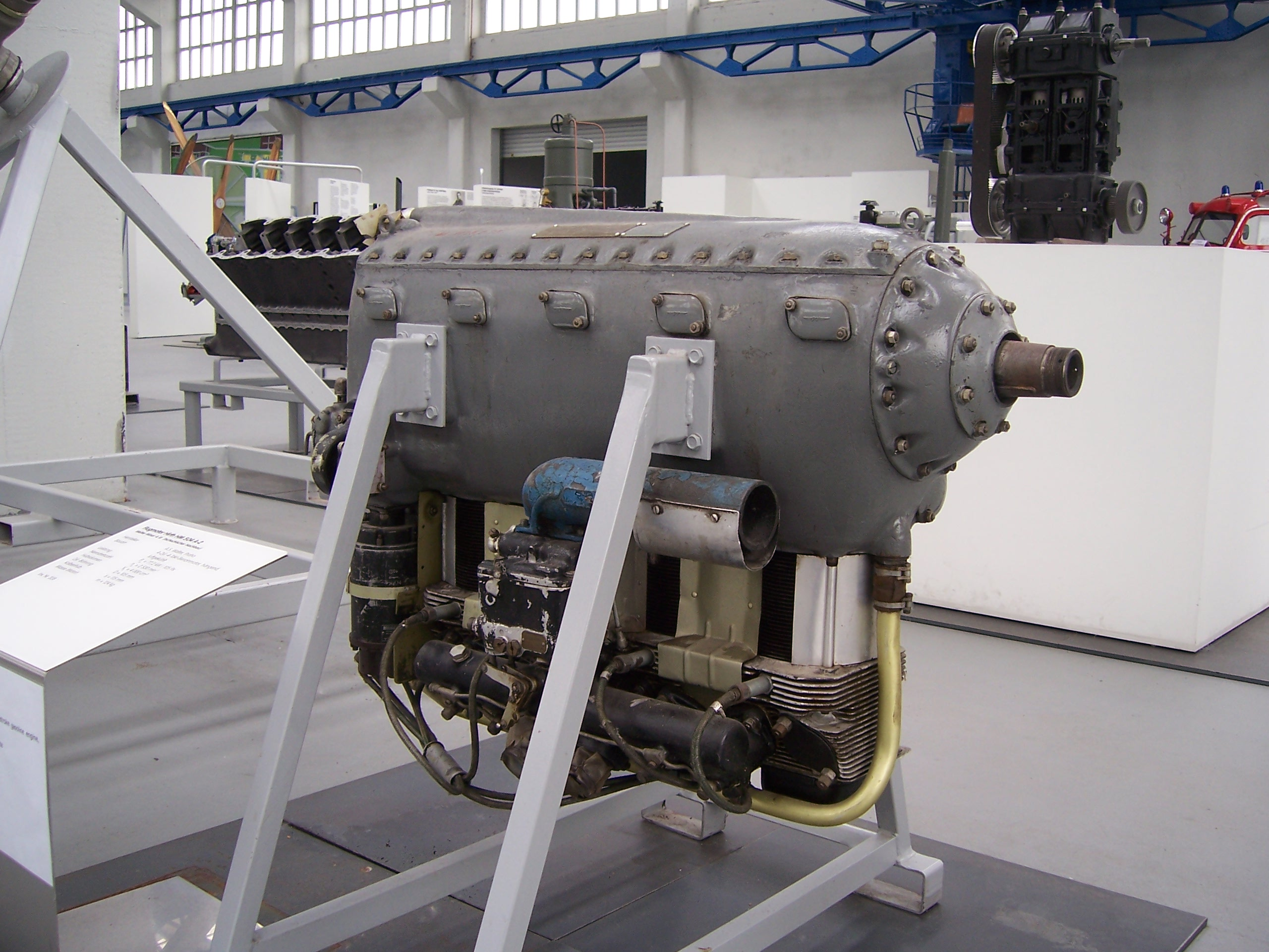 Walter Minor 4-III im Technikmuseum Hugo Junkers Dessau 2010-08-06